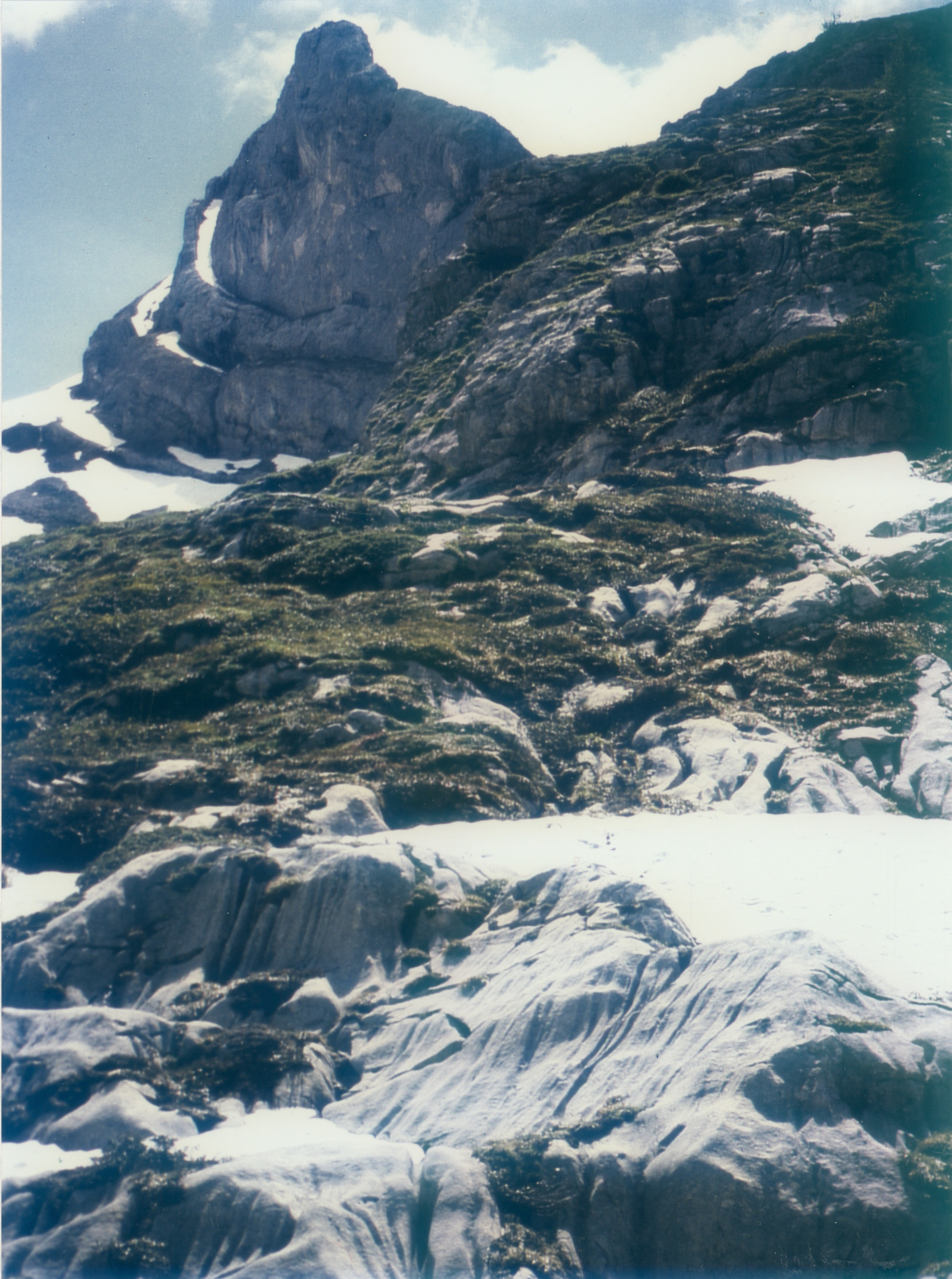 Französische Kalkalpen auf über 2000 m über NN; im Hintergrund gebogene Kalkschichten im Vordergrund die Kalke, in denen die fossile Koralle gefunden wurde; Bild aus dem auf Martin Wagenschein basierenden Lehrstücks "Wettersteine" (1997)